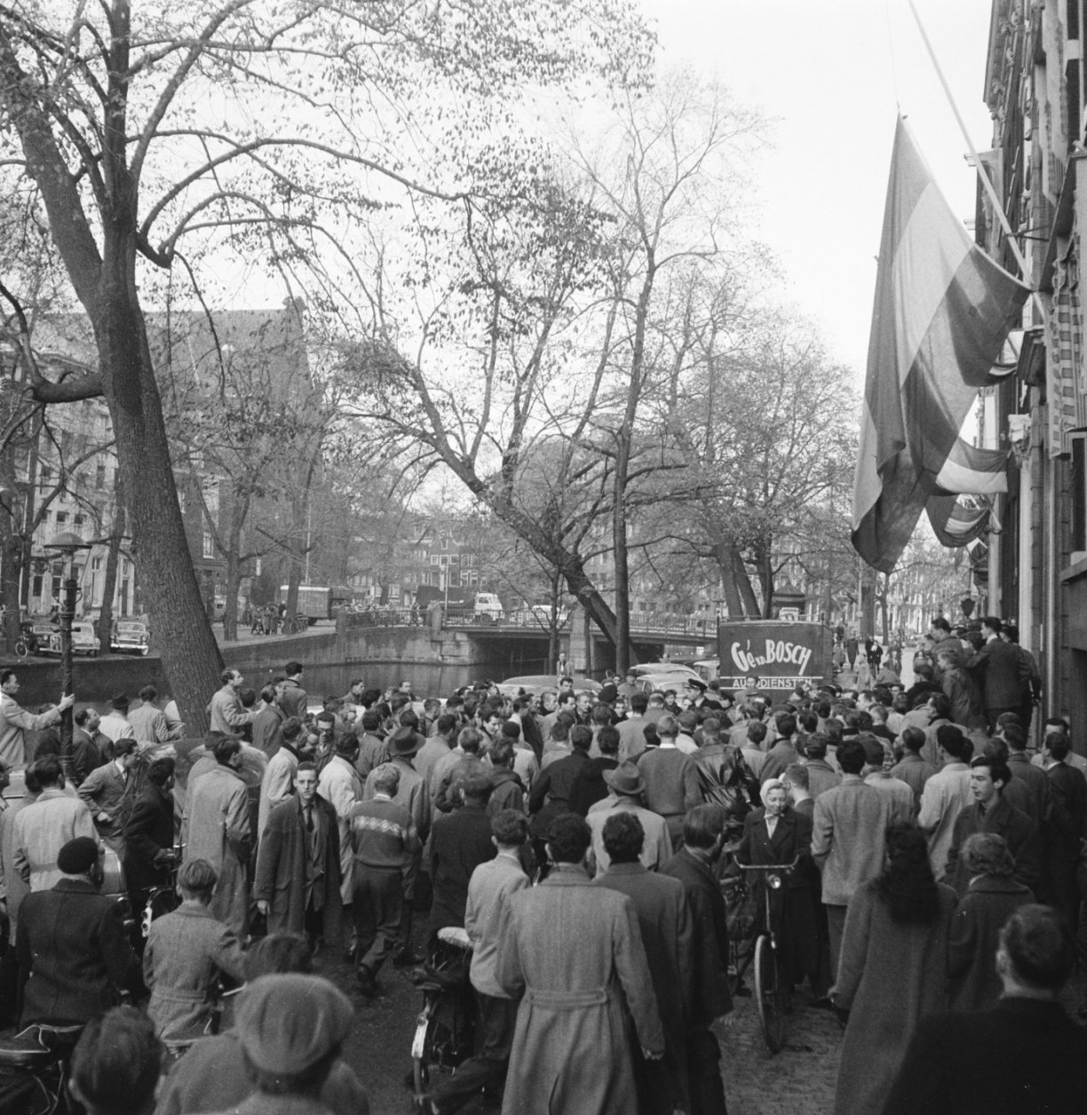 Relletjes op de Keizersgracht bij het redactiekantoor van De Waarheid in het gebouw Felix Meritis n.a.v. de Hongaarse Opstand